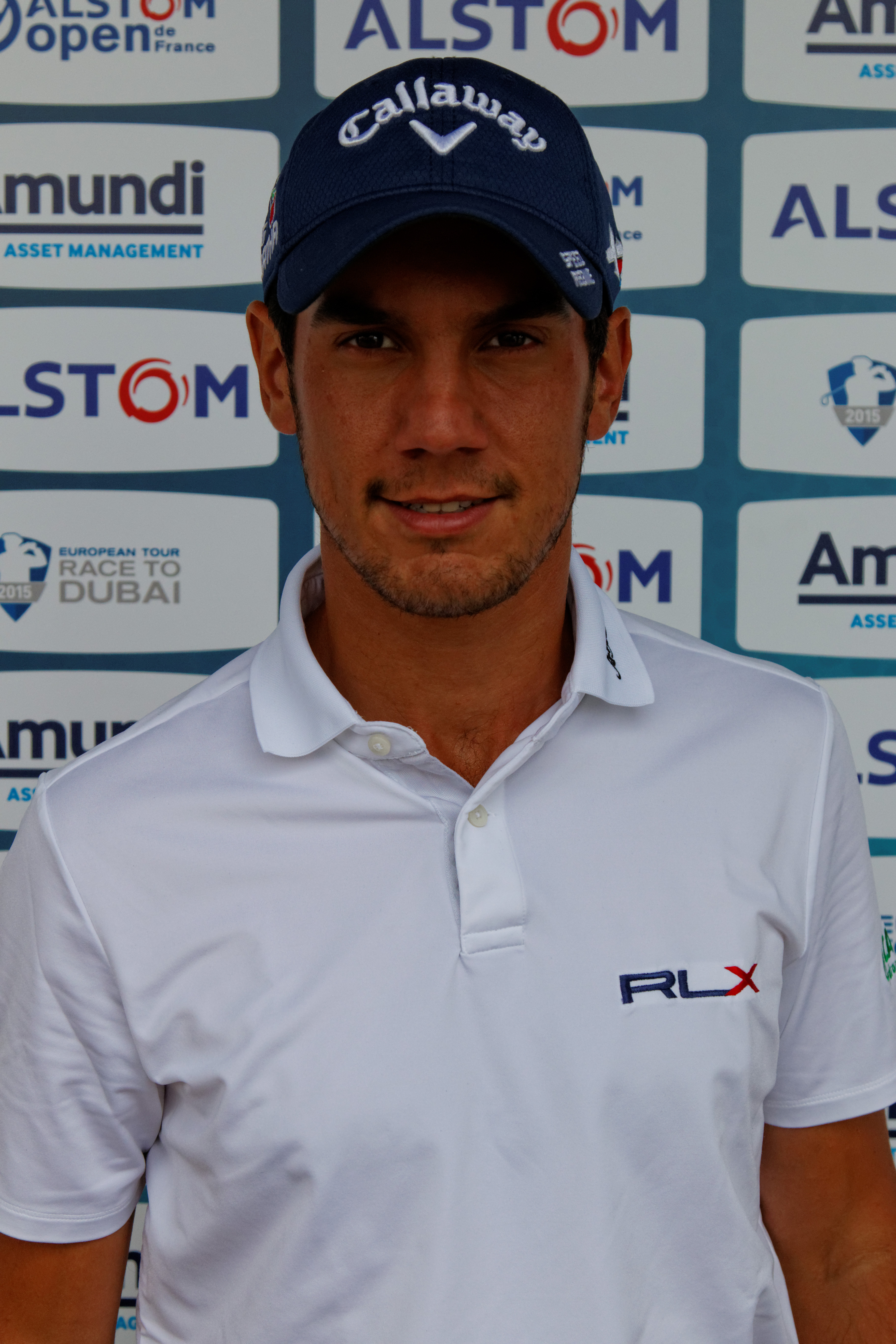 Image prise lors de l'Alstom - Open de France 2015 (4ème tour)